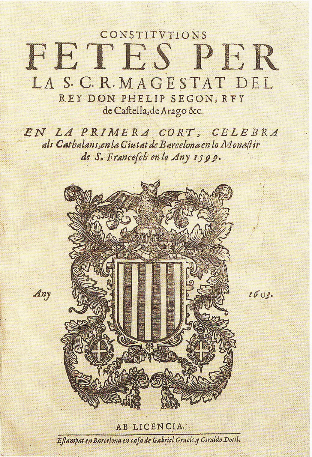 Constitucions, capítols i actes de Cort de les Corts de Barcelona de 1599 presidides per Felip III de Castella, II d'Aragó i Portugal i V de Navarra.